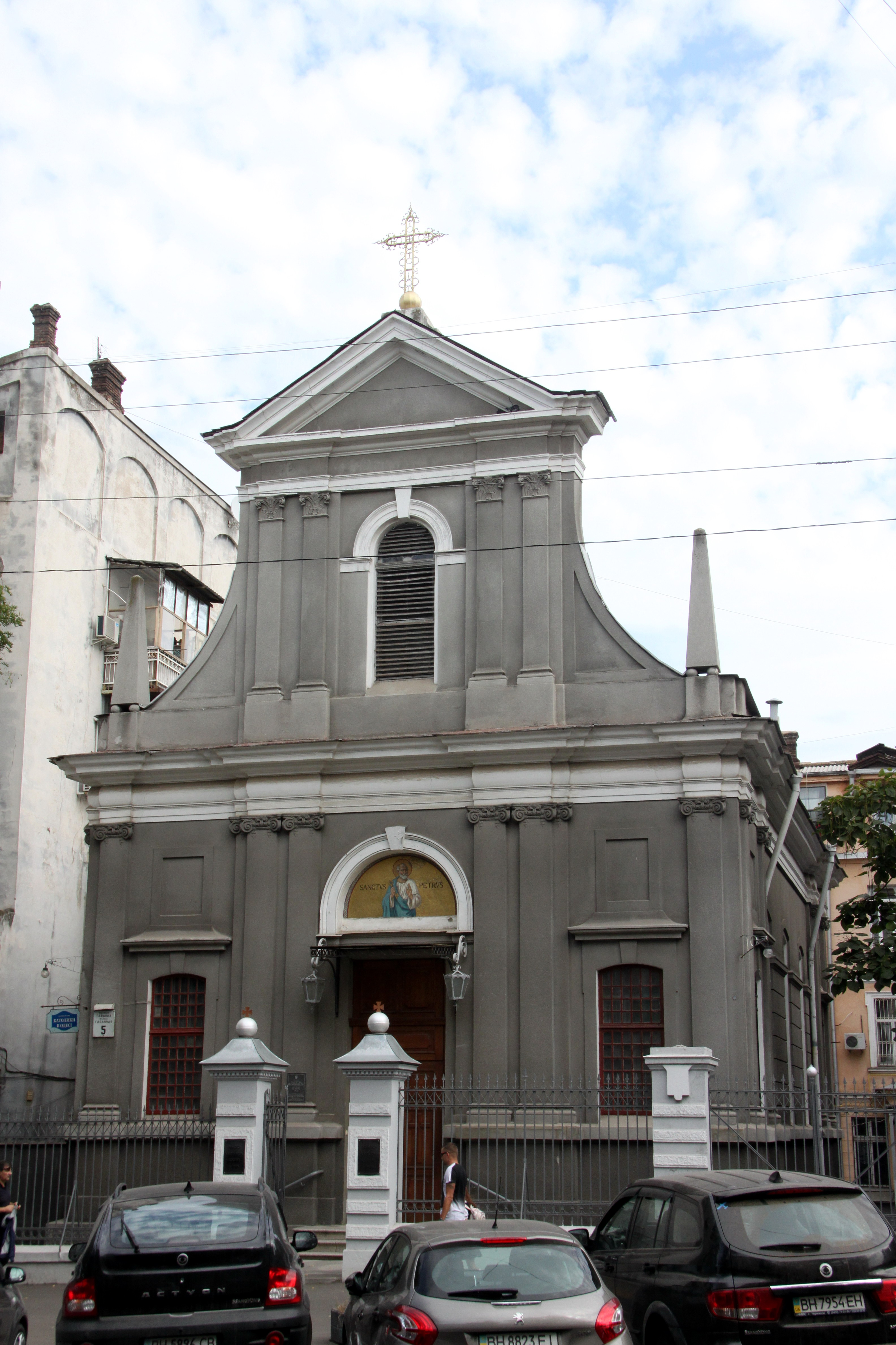 Костьол св. Петра, Гаванна вул., 5, Одеса